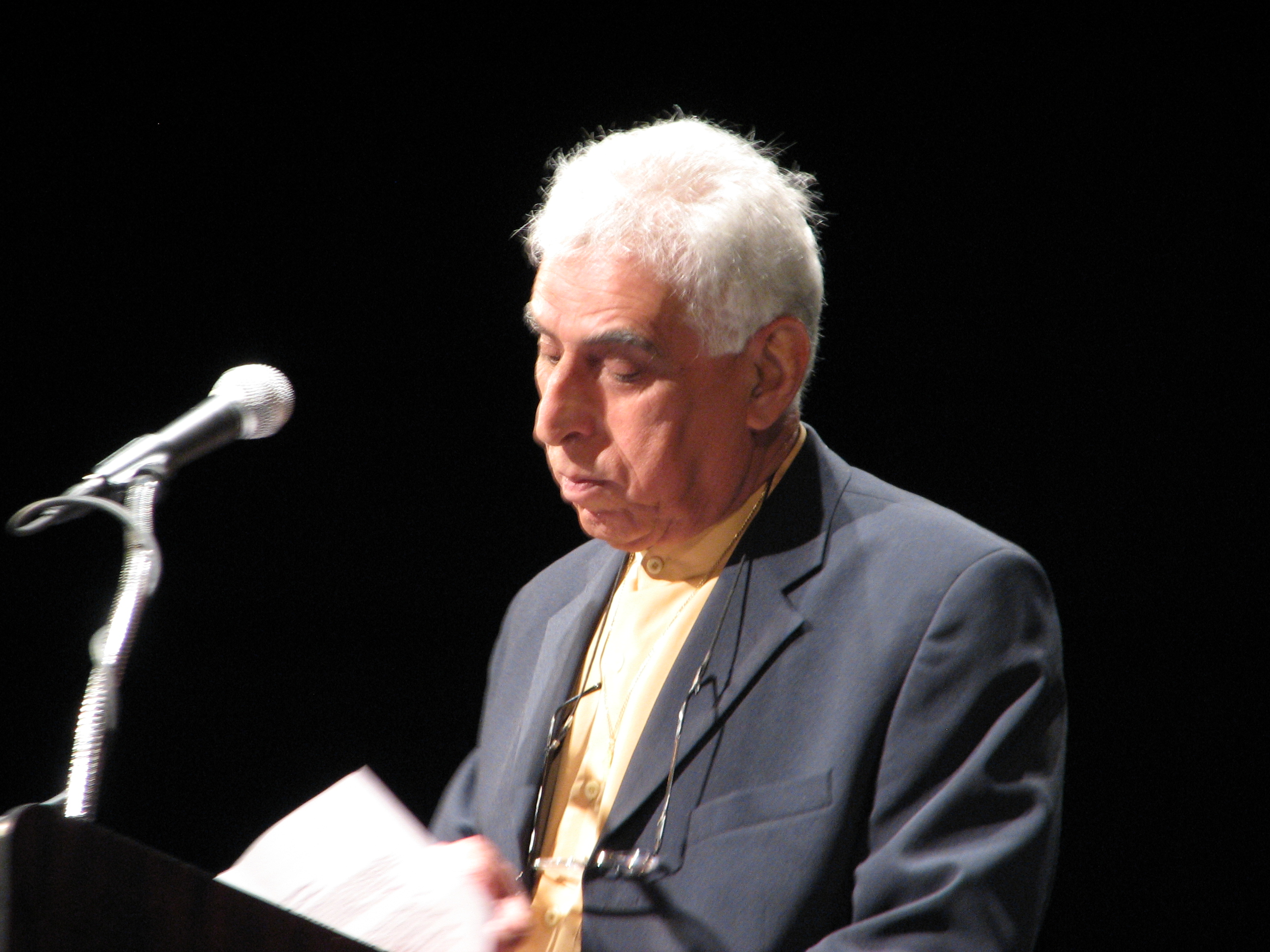 Saadi YoussefSaadi Youssef